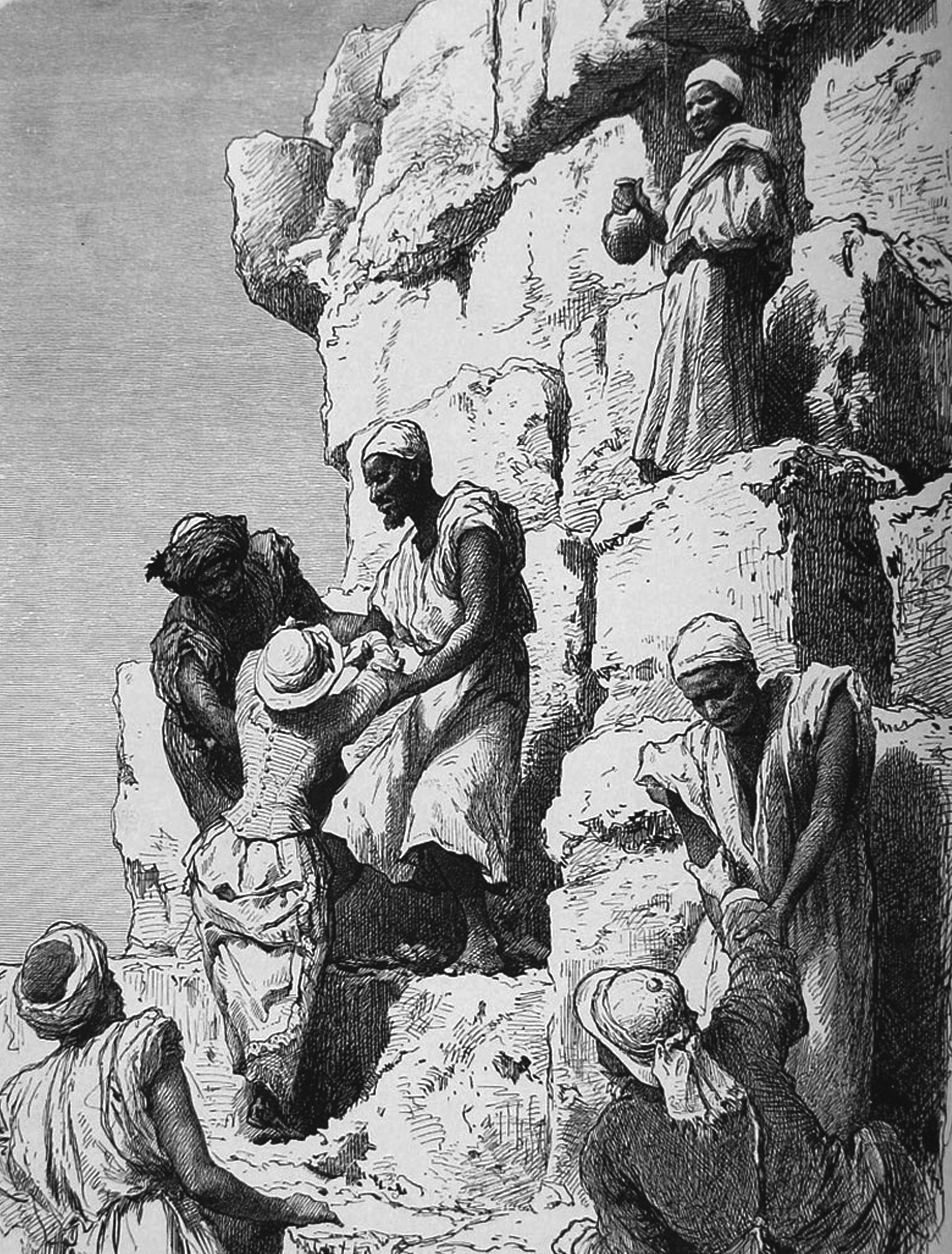 a